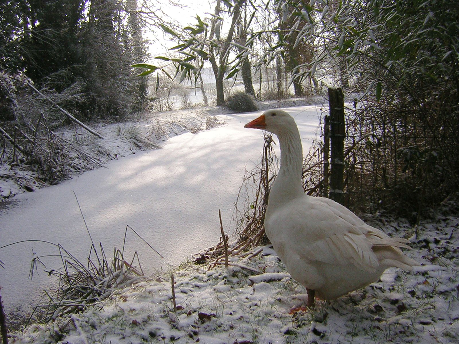 Goosetave disappointed